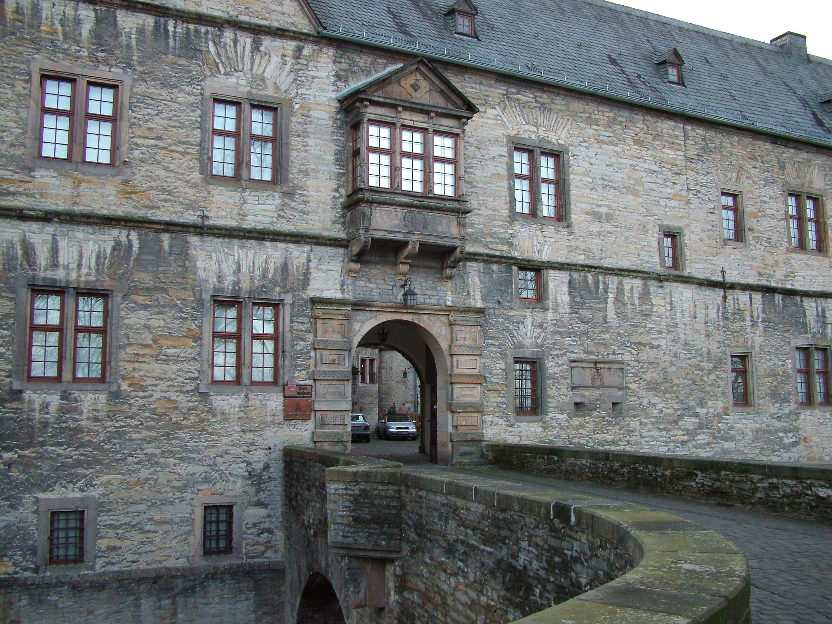 WewelsburgThis is a photograph of an architectural monument., no. 0